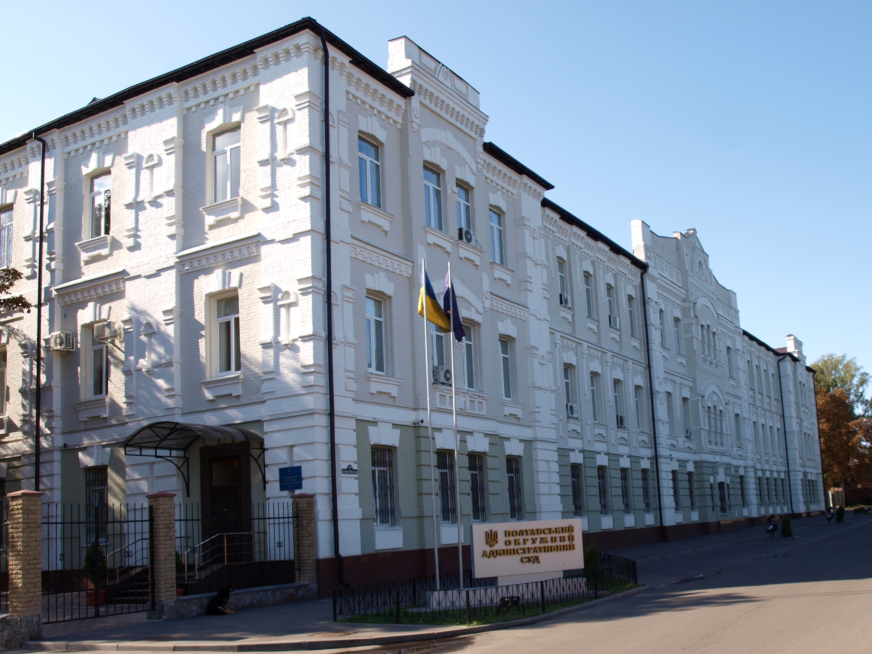 Полтавський окружний адміністративний суд